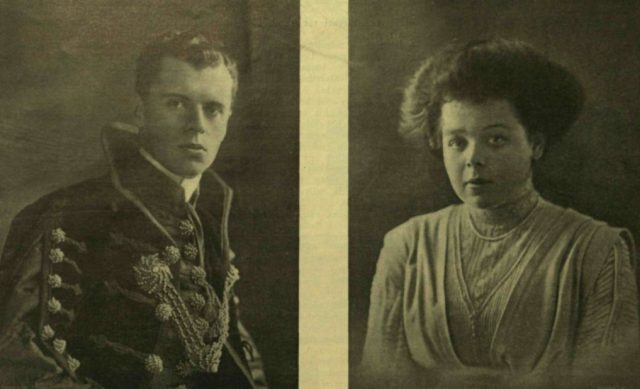 aus 'Vasárnapi Újság' vom Dezember 1910